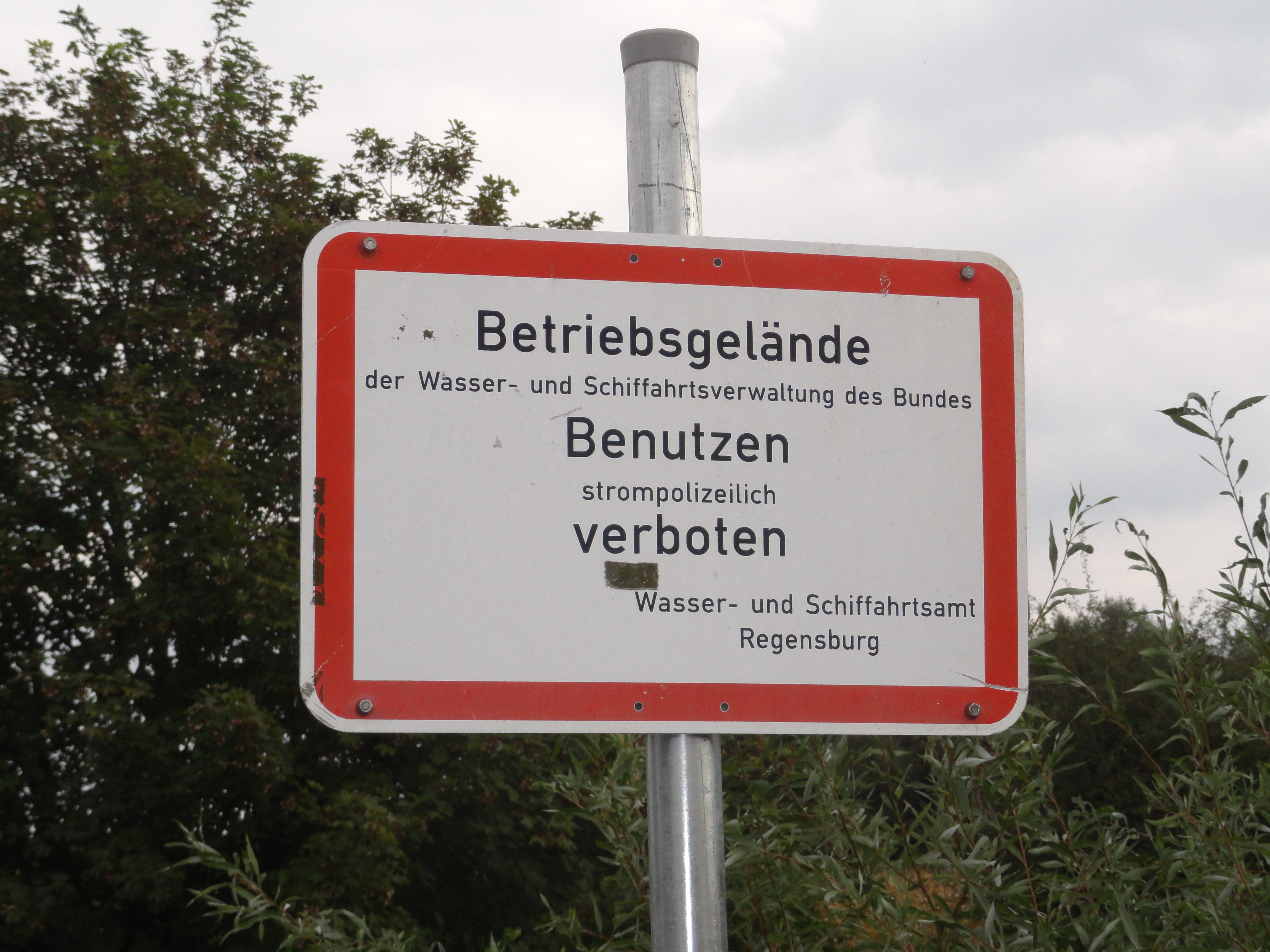 Schild Betriebsgelände an der Kleinen Laber bei Landstorf in der Gemeinde Aholfing